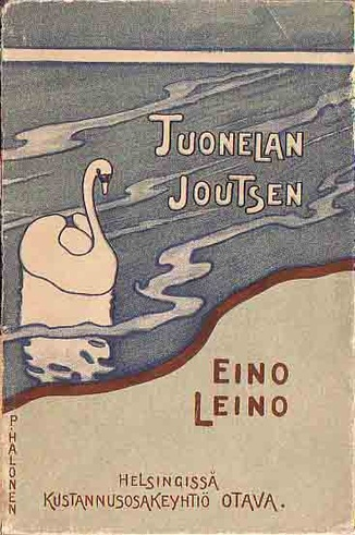 Eino Leino Tuonelan joutsen kansi (1898)